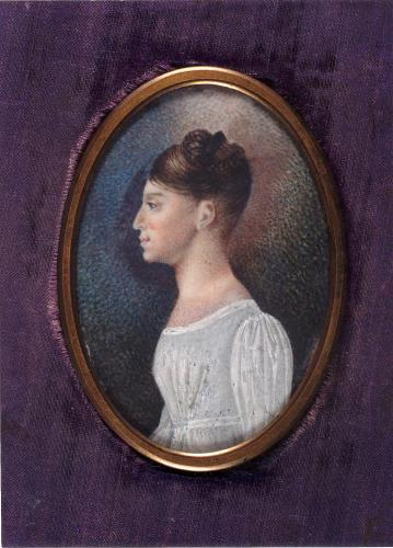 Emilia Chopin